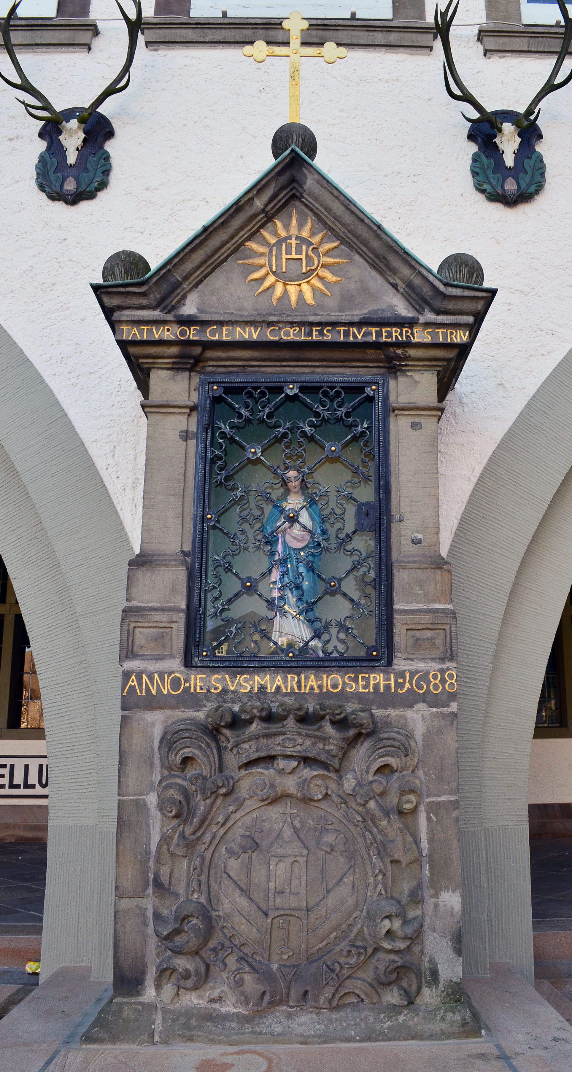 Brilon Am Markt 1 Bildstock an der Rathausfassade 2. This image shows a heritage building in Germany, located in the North Rhine-Westphalian city Brilon.